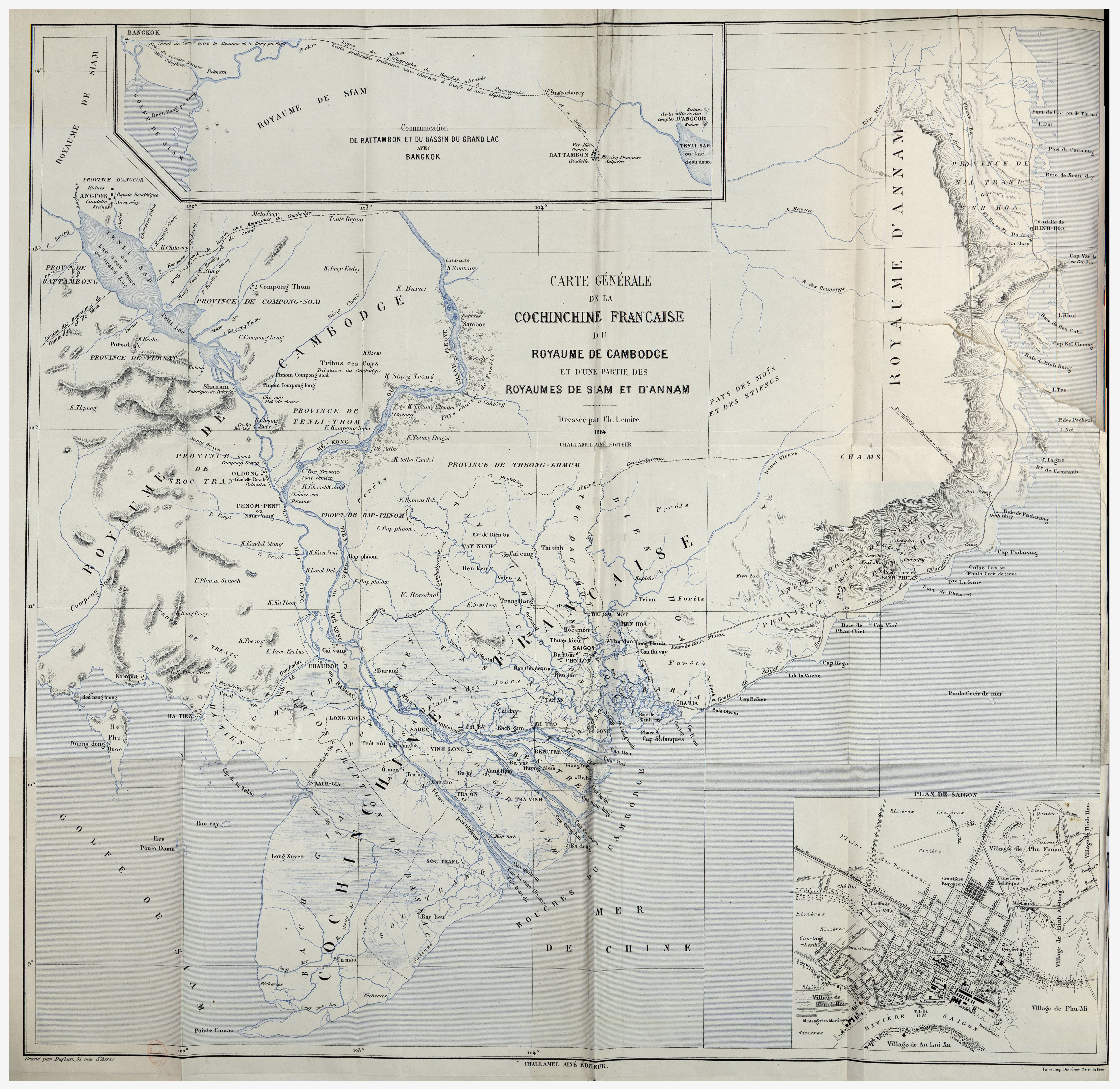 Bản đồ Nam Kỳ thuộc Pháp, Campuchia thuộc Pháp và phần phía nam Trung Kỳ năm 1884. Bản đồ mô tả chi tiết hành chính xứ Nam Kỳ thuộc Pháp năm 1884, cùng với bản đồ chi tiết Sài Gòn.